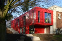 Die Bibliothek des Gymnasium Andreanum Hildesheim